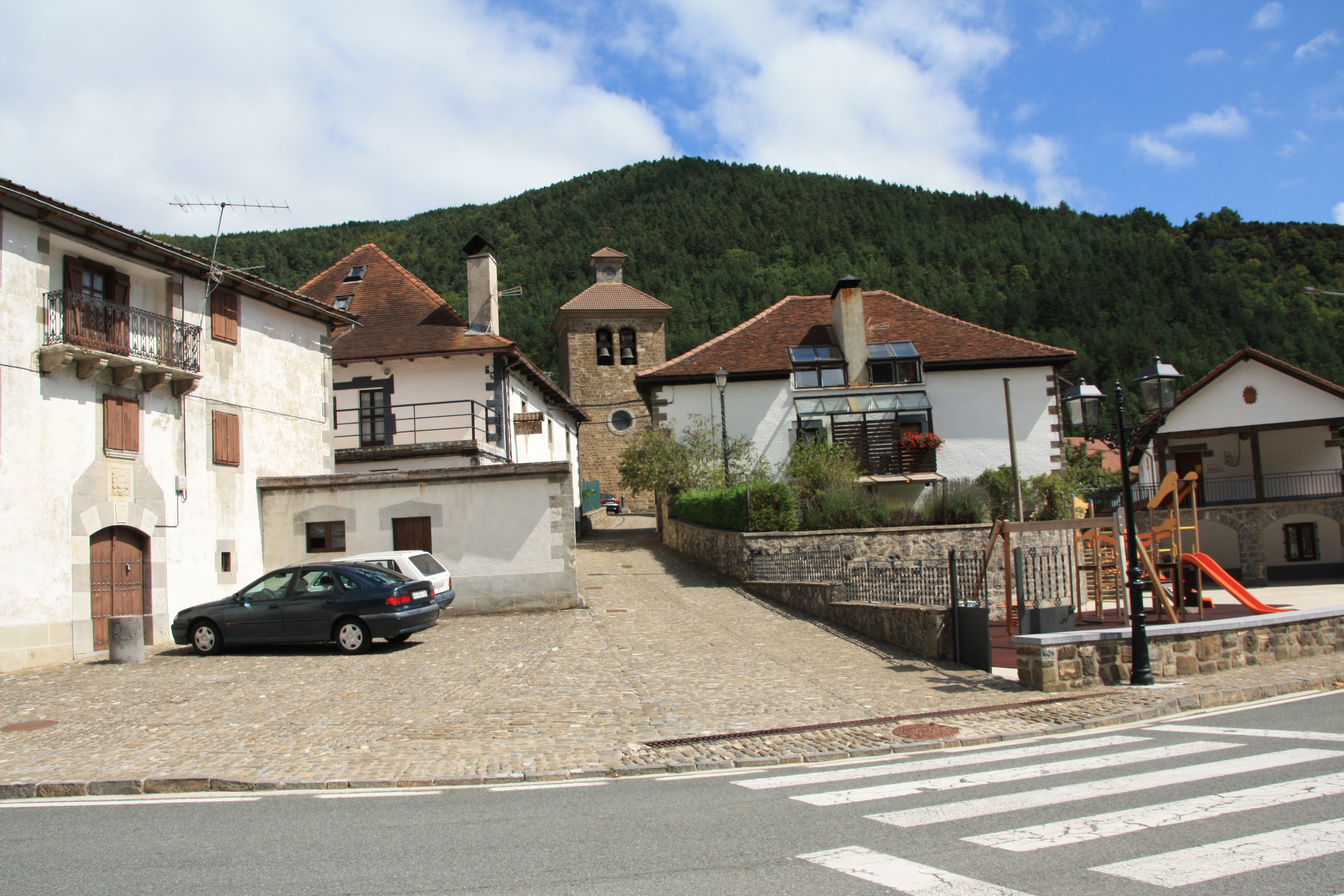 Orontzeko ikuspegia errepide nagusitik.